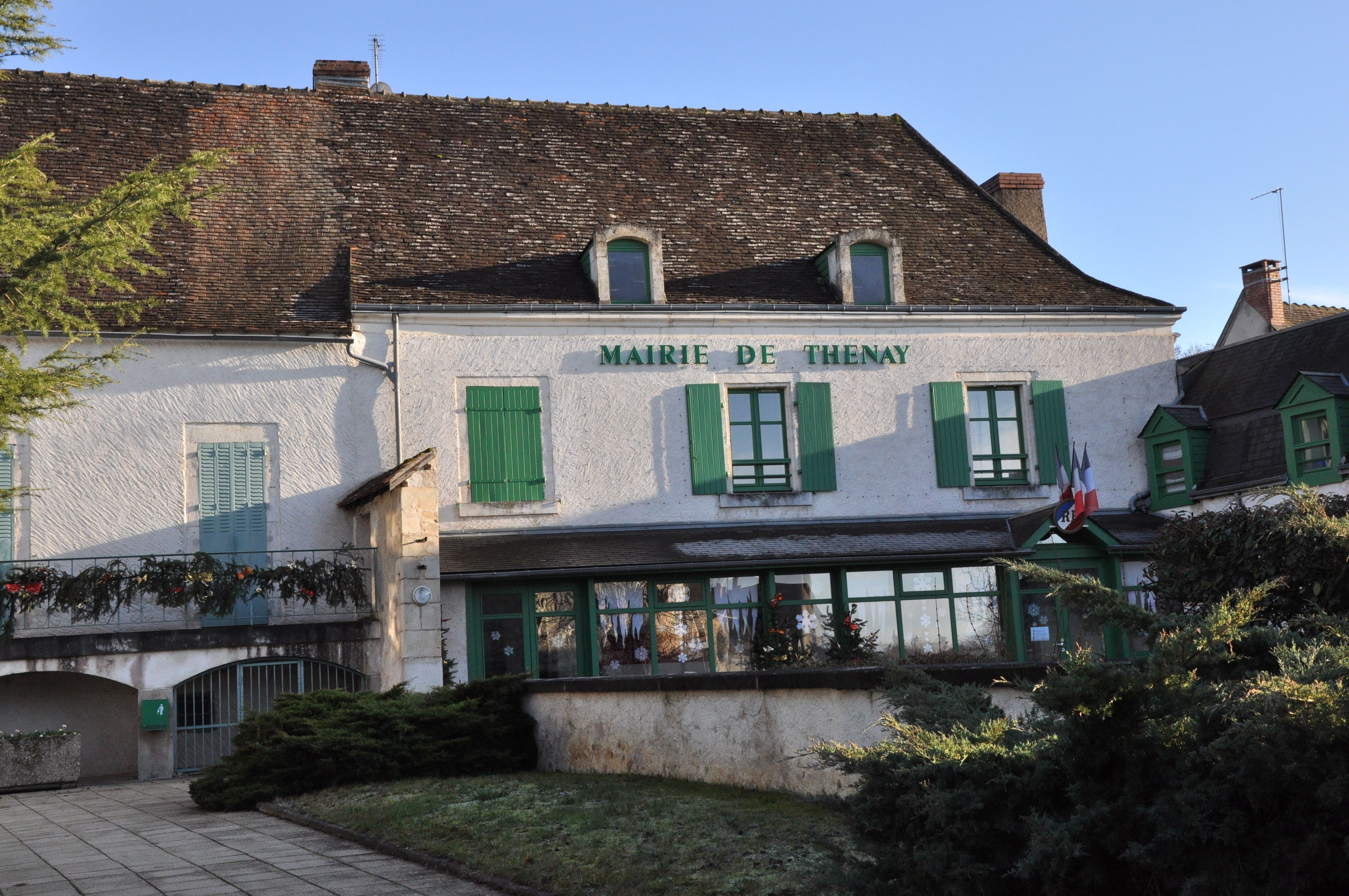 Bürgermeisteramt ("Mairie") von Thenay, einer Gemeinde im Département Indre in Zentral-Frankreich.